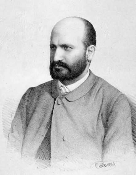 Retrato de Pedro Antonio de Alarcón